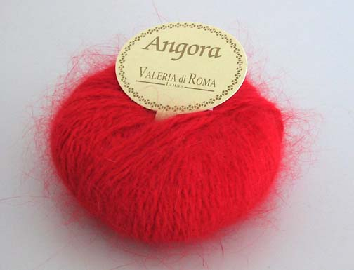 ovillo angora valeria di roma